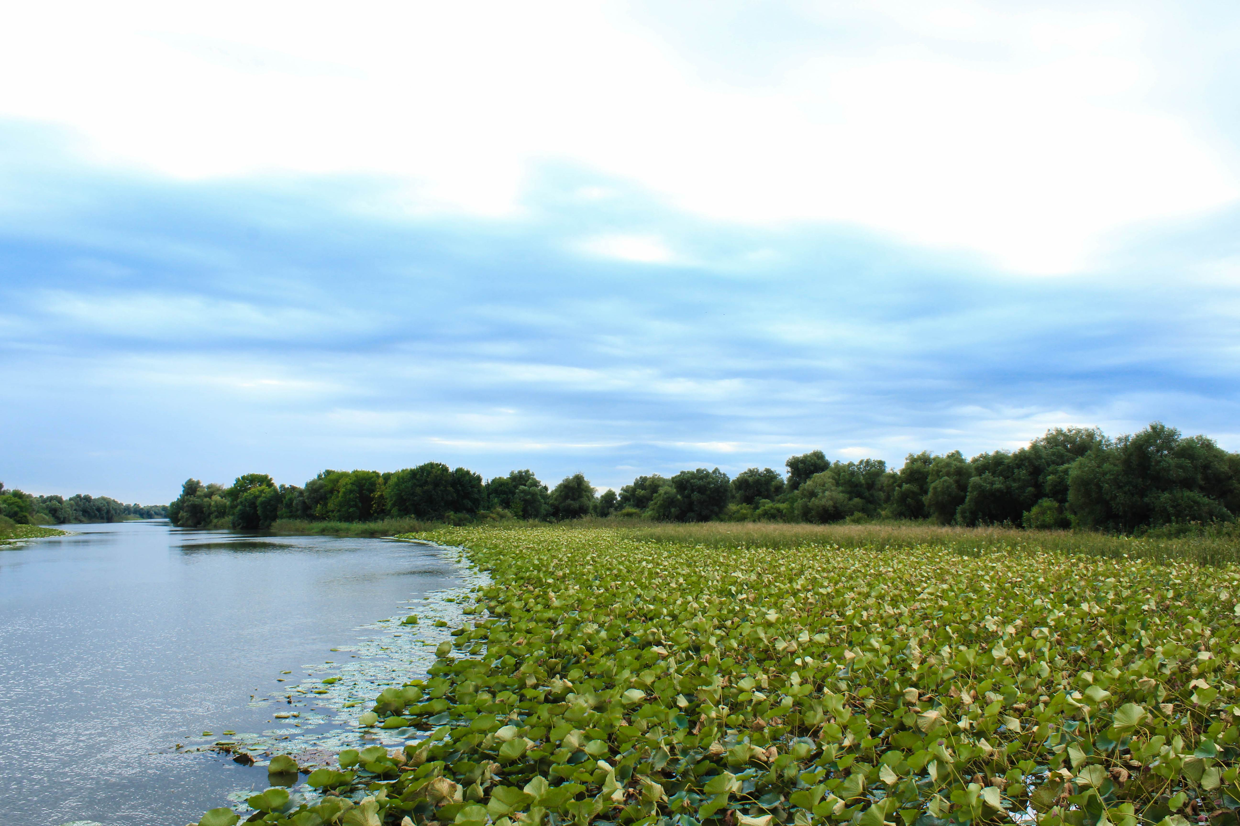 Астраханский заповедник: Заповедник расположен в южной части Астраханской области, в дельте реки Волги. Заповедник расположен на территории трех административных районов области: Володарского, Икрянинского и Камызякского, представляет собой три обособленных участка, расположенных в разных частях дельты Волги, Володарский район, Астраханская область. На фотографии Дамчикский участкок в западной части дельты. This image is related to the protected area of Russia number 3000013